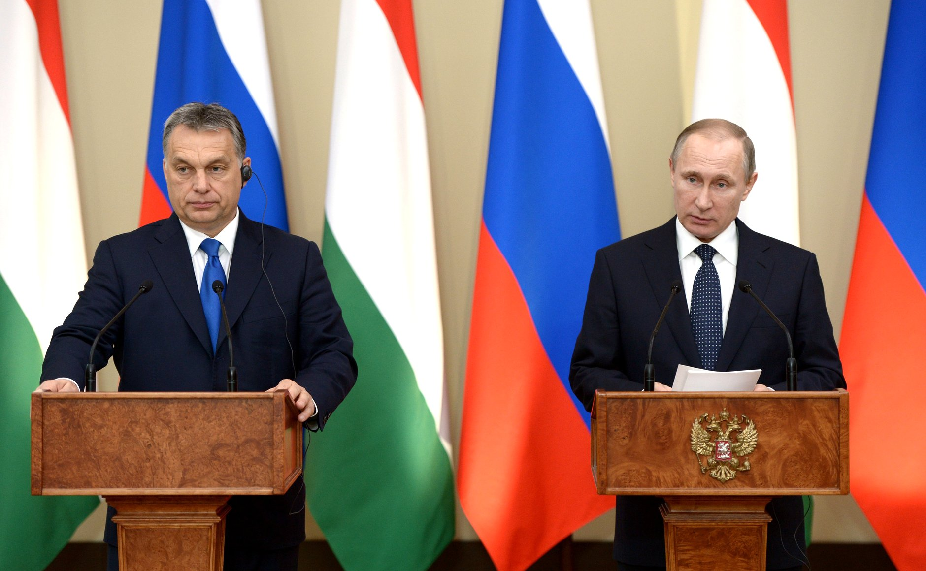 Встреча Президента России Владимира Путина с Премьер-министром Венгрии Виктором Орбаном